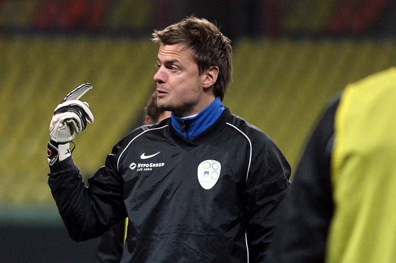 Aleksander Šeliga